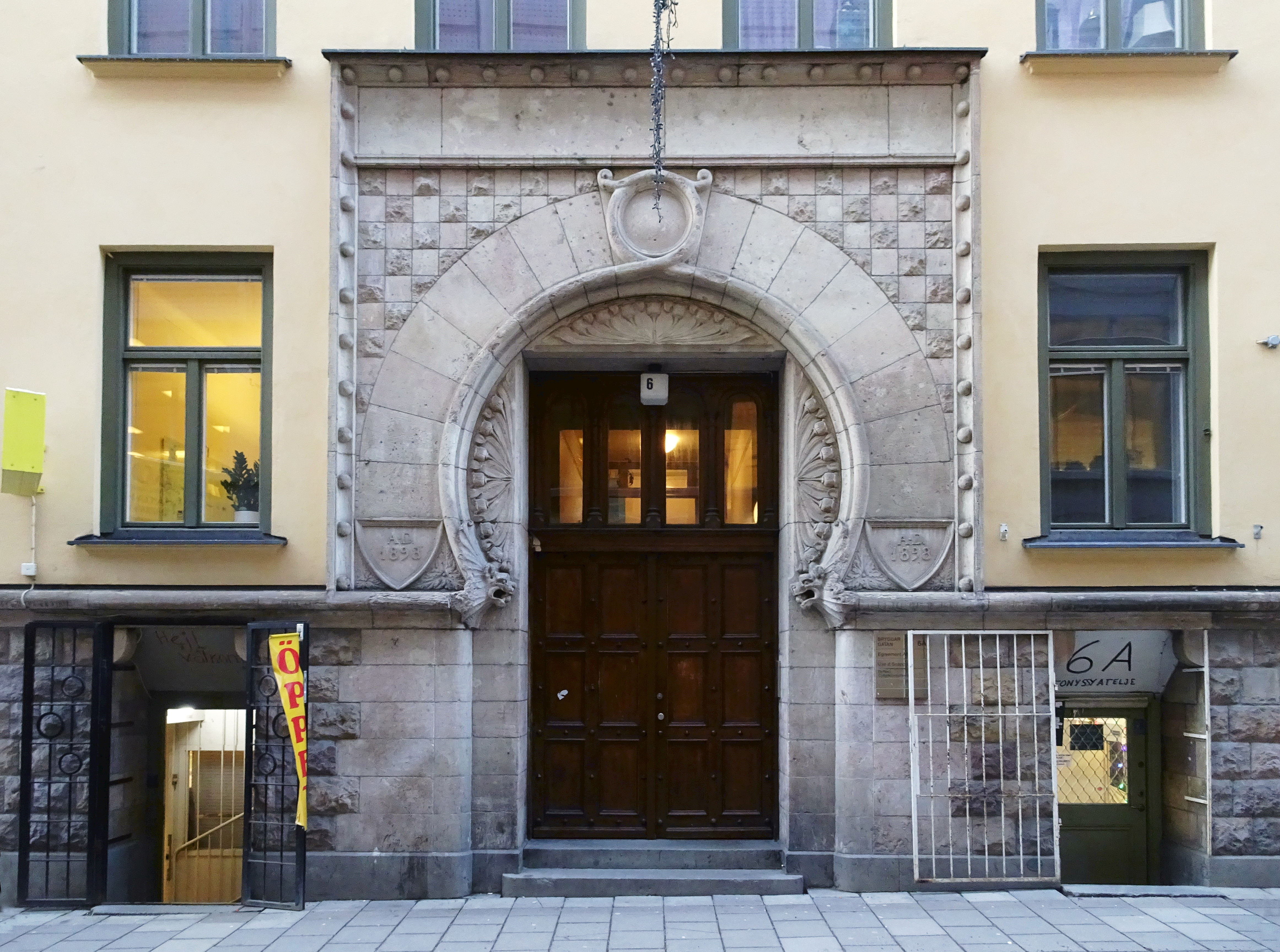 Bryggargatan 6, portal. 1898 - 1901 Nybyggnad. Dufva J. H & Dufva H. G. (Byggherre) Eduard Hallquisth (byggmästare) Ullrich Fritz & Hallquisth Edvard (Arkitekt)